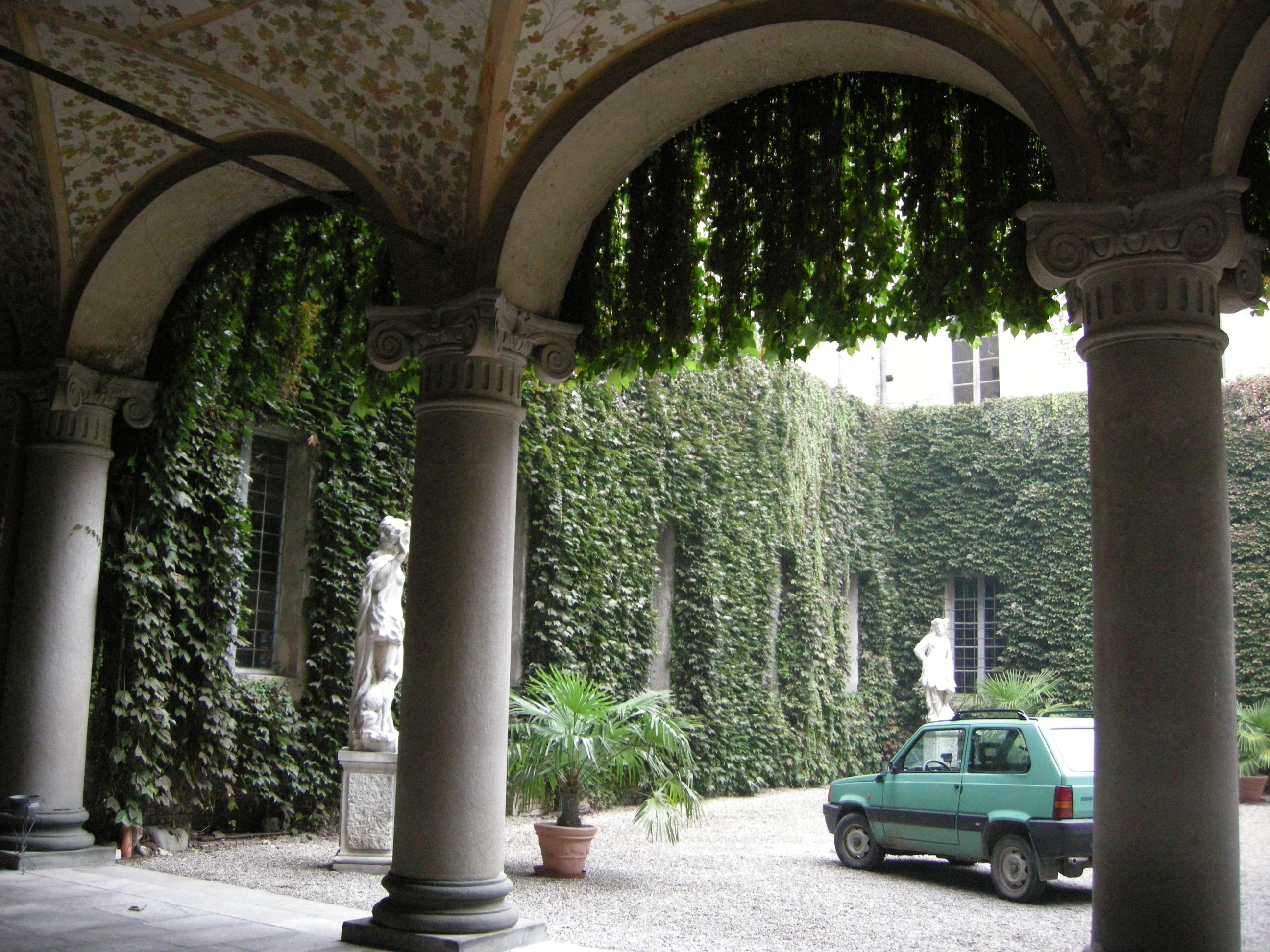 Soragna, rocca